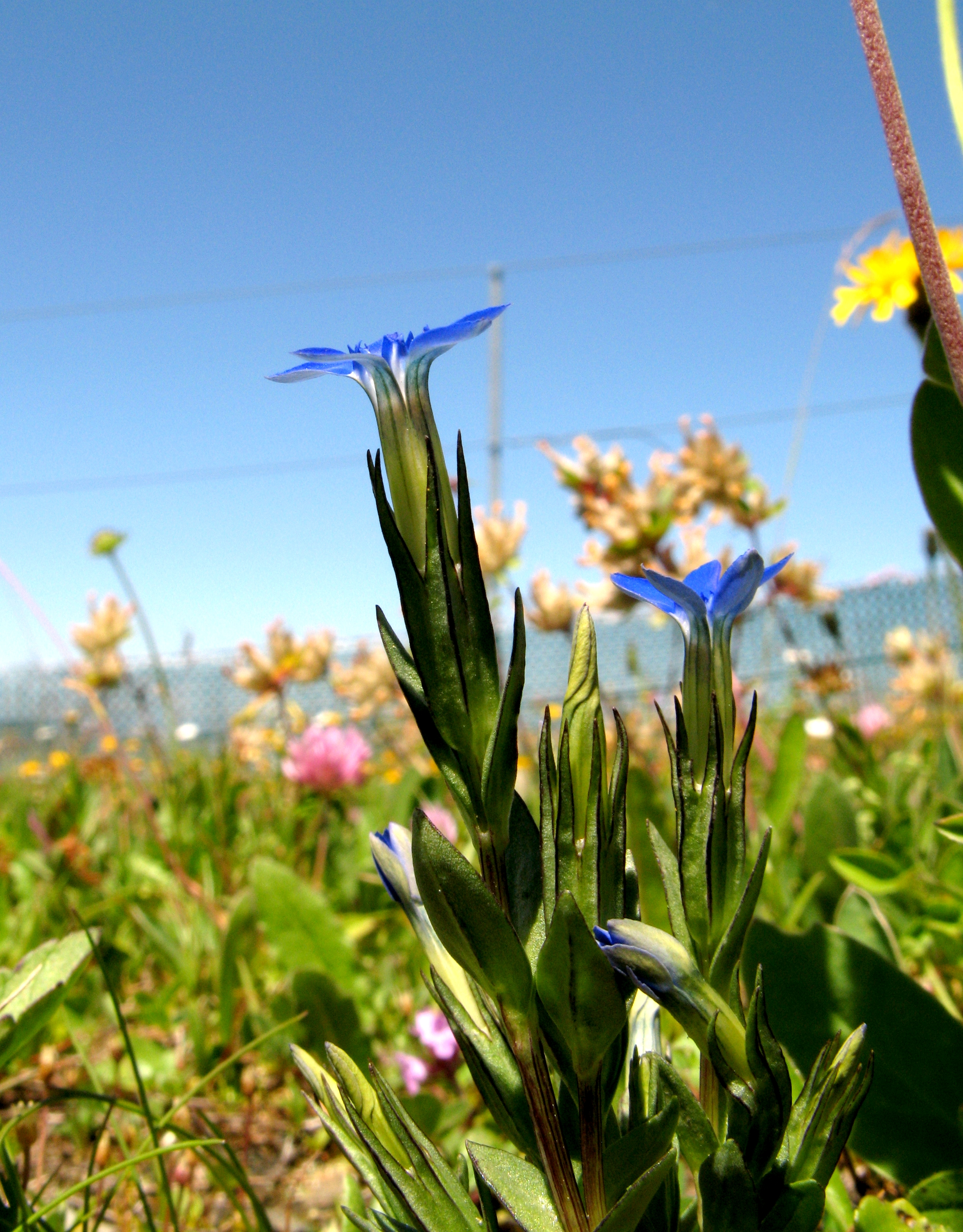 Schnee-Enzian (Gentiana nivalis) auf dem Fellhorn (Allgäuer Alpen) bei Oberstdorf